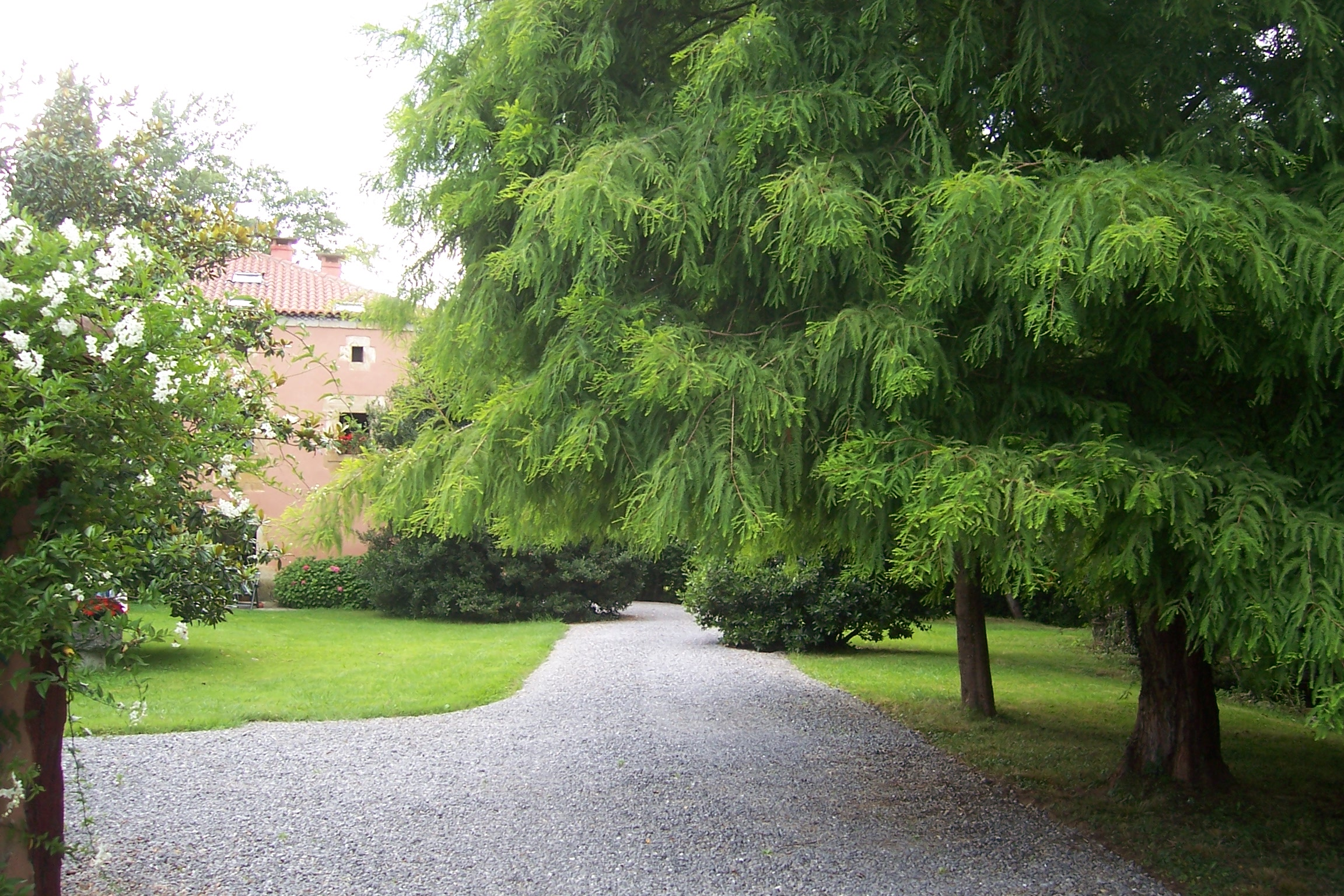 Secadura es una localidad del municipio de Voto (Cantabria, España).